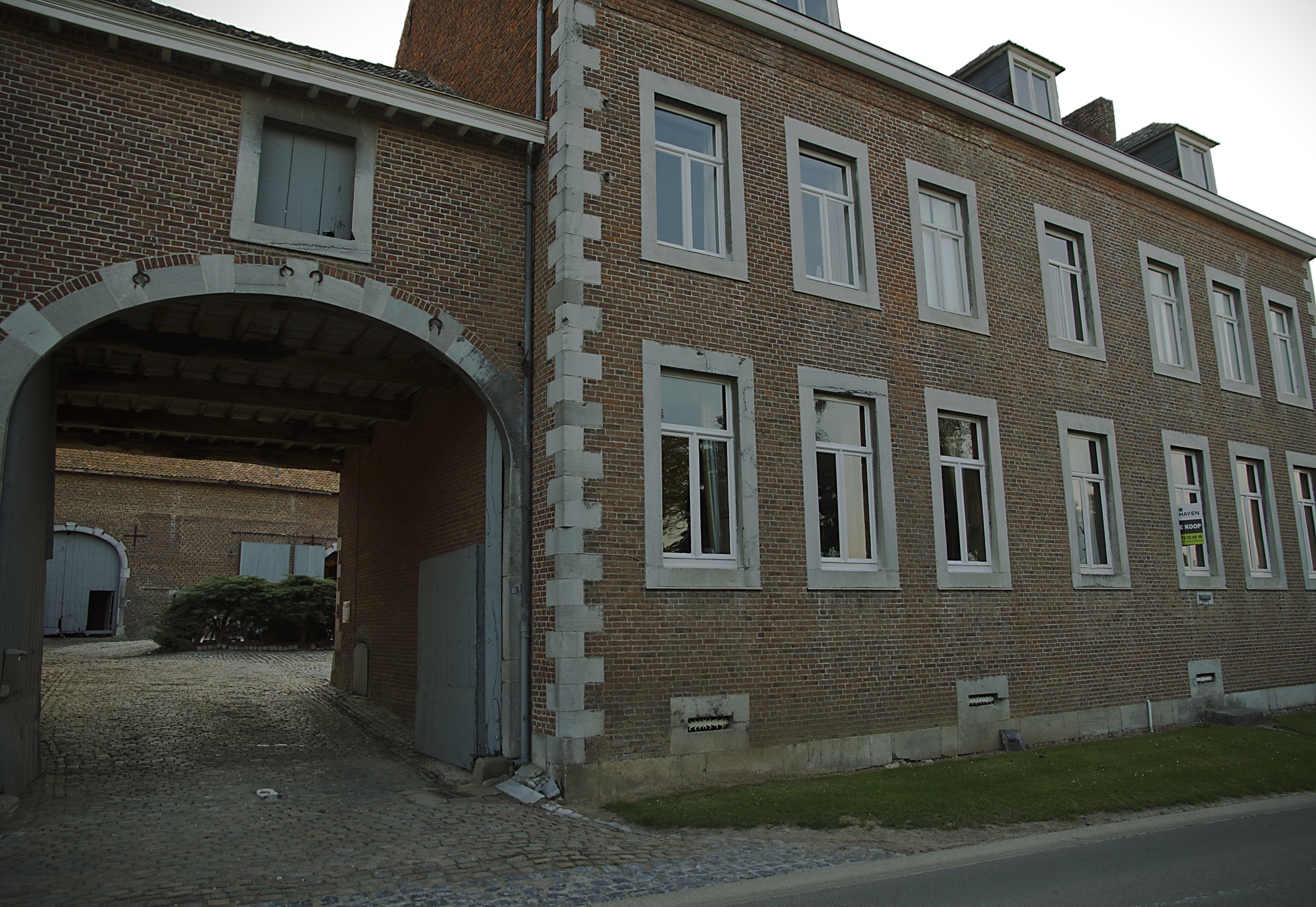 Ruime gesloten hoeve in Klein-Gelmen, deelgemeente van Heers in de provincie Limburg.